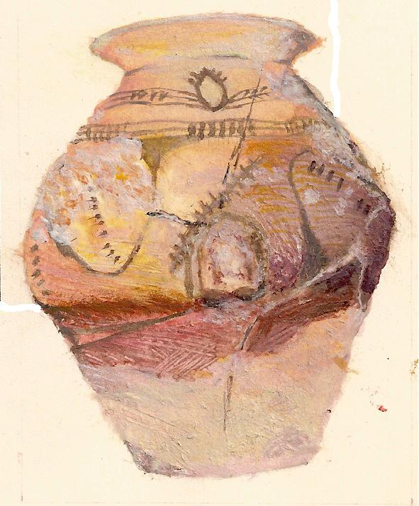 naczynie z okresu kultury trypolskiej z miejscowości Blicze Zlote (Ukraina)